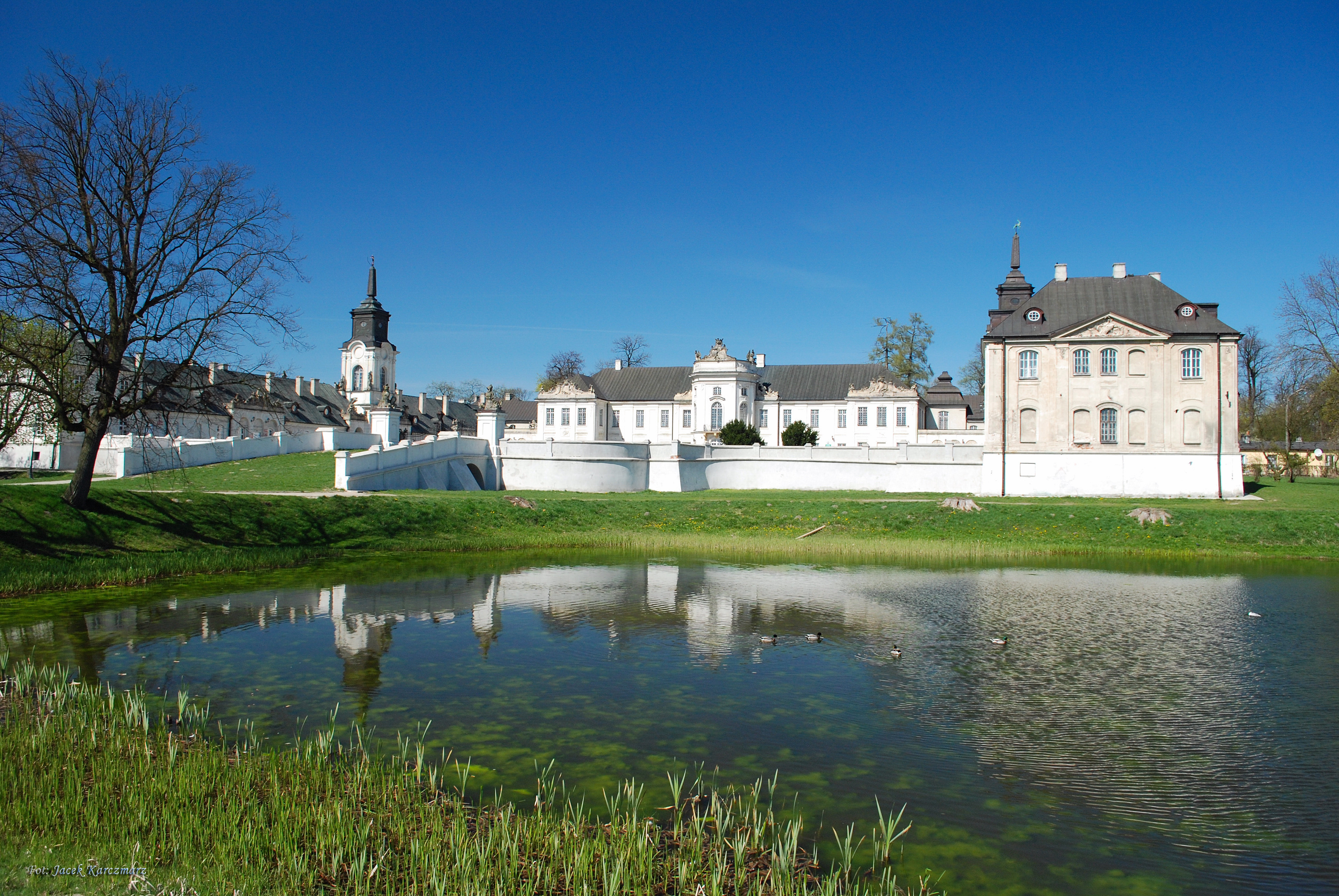 Radzyń Podlaski, Pałac Potockich